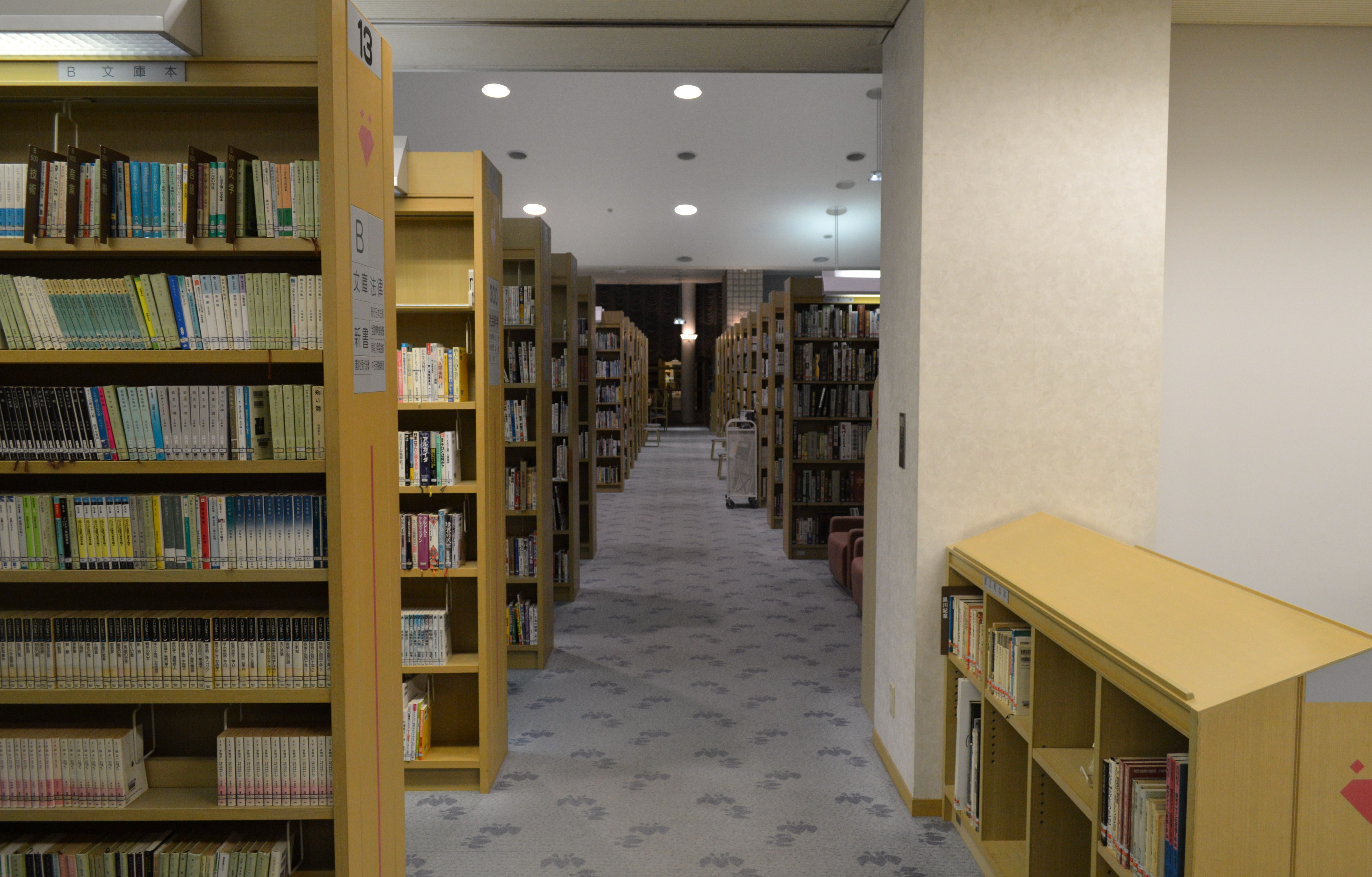 愛知県海部郡の蟹江町図書館。